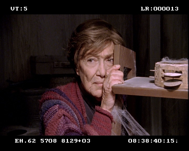 בתיה לנצט בסרטו של חורחה גורביץ' השרשרת של פסיה